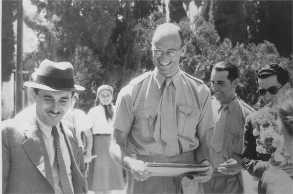 דגניה - קפיטן ג'יימס רוזוולט בנו של הנשיא רוזוולט